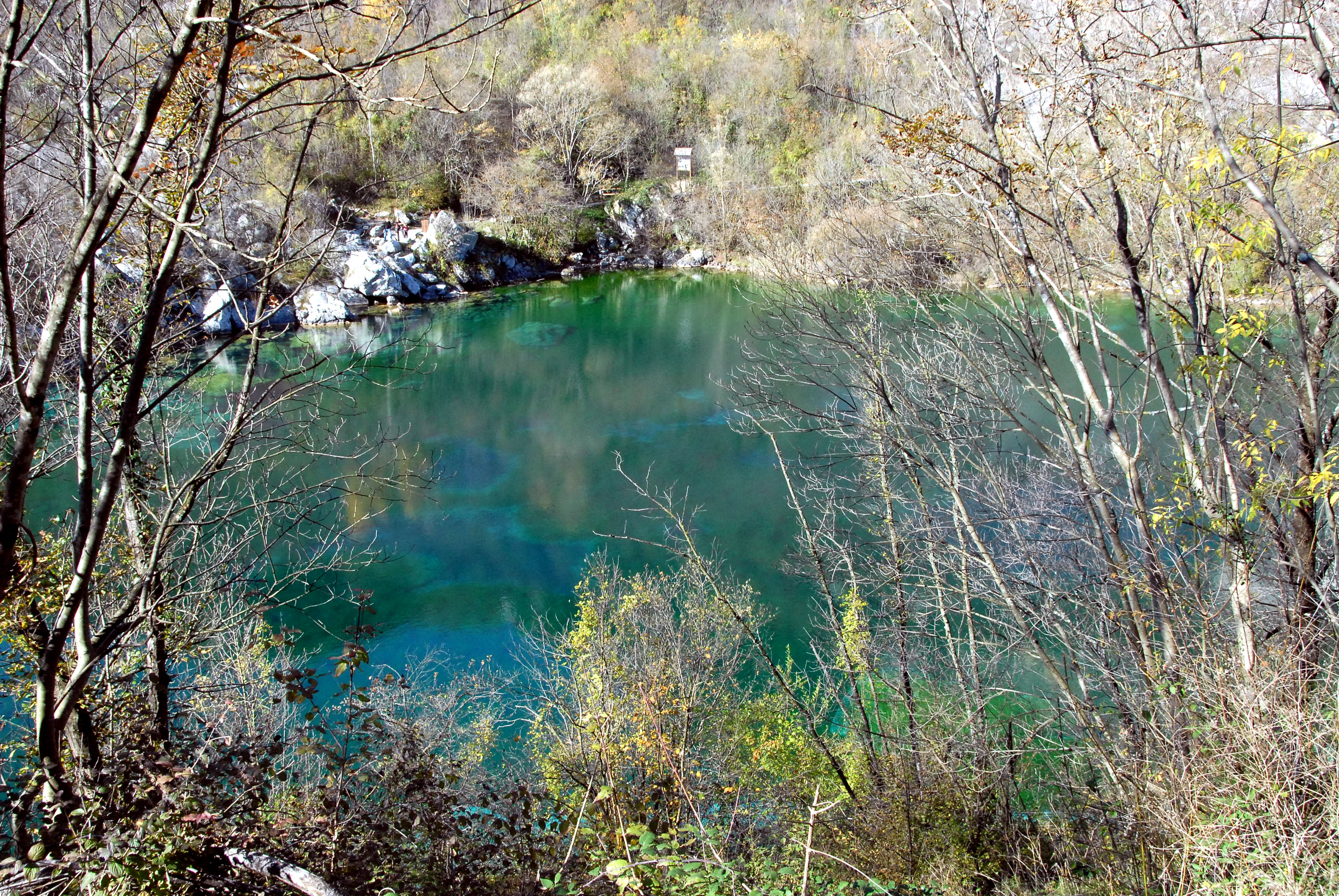 Lago di Cornino in the community of Forgaria nel Friuli, province of Udine, region Friuli Venezia-Giulia, Italy